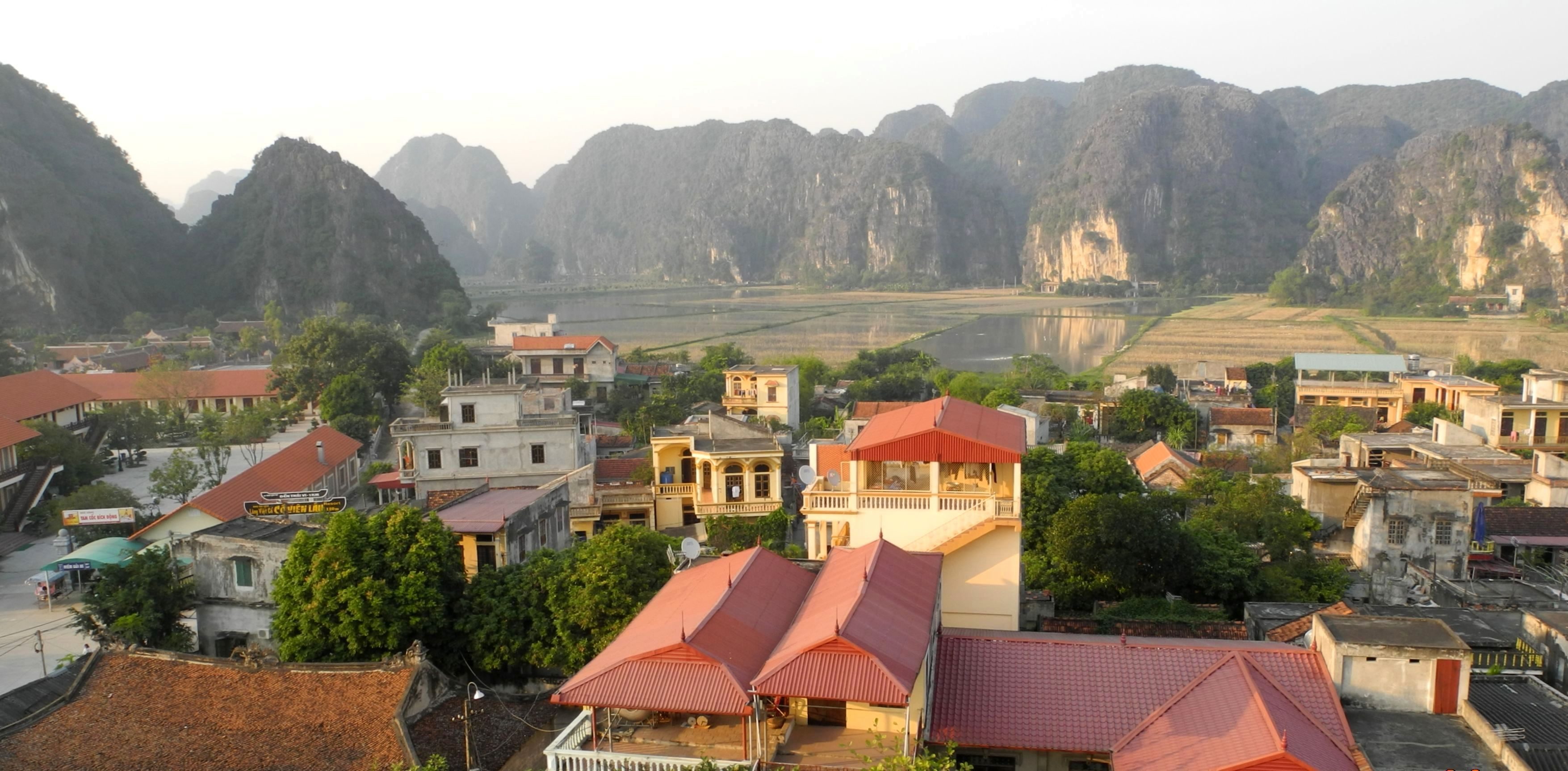 Ninh Binh-Ortsbild03